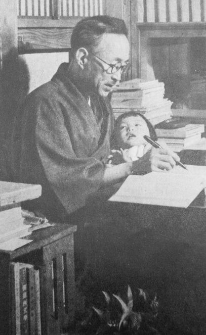 中村白葉